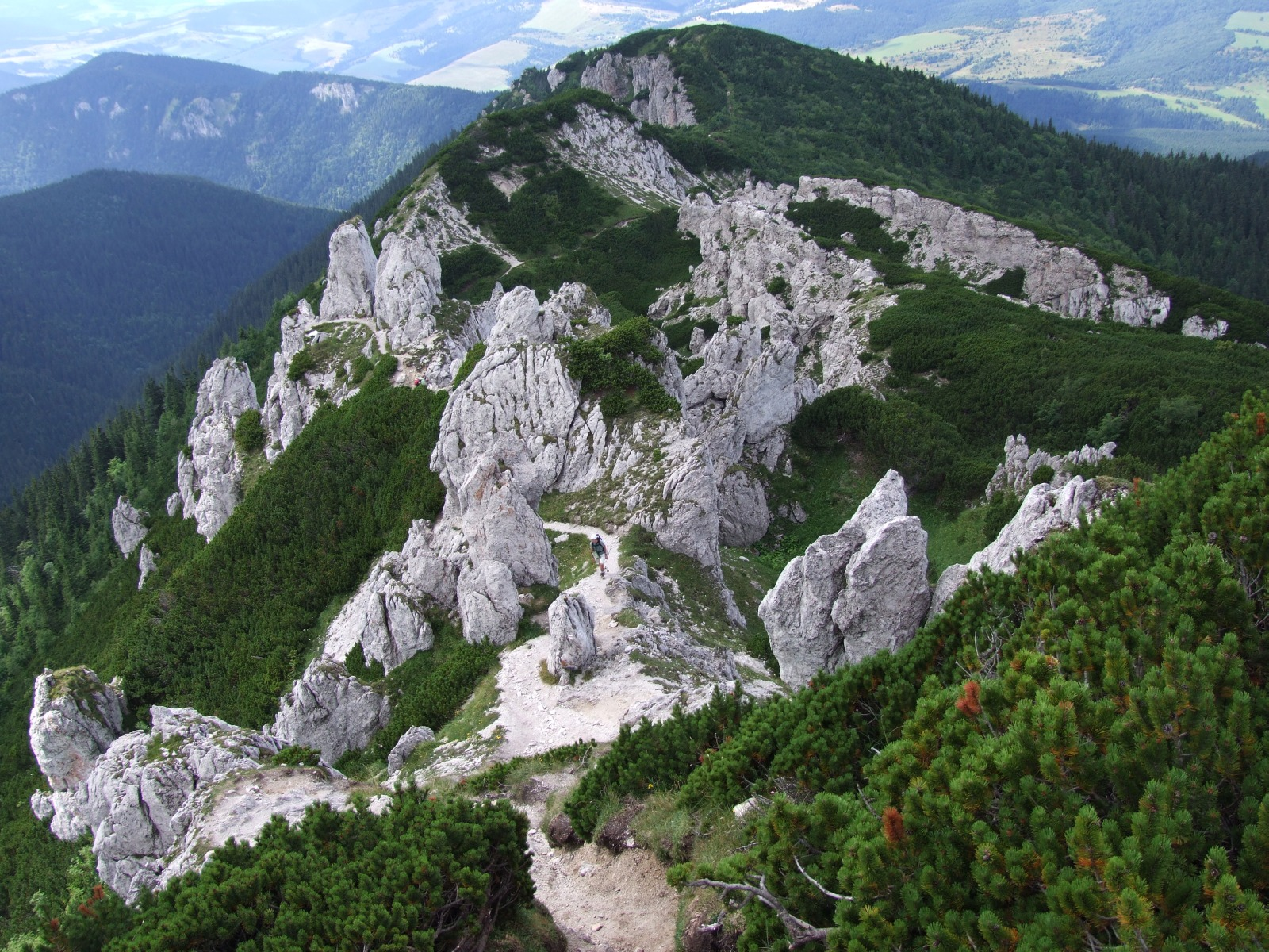 Grń Siwego Wierchu (Tatry)